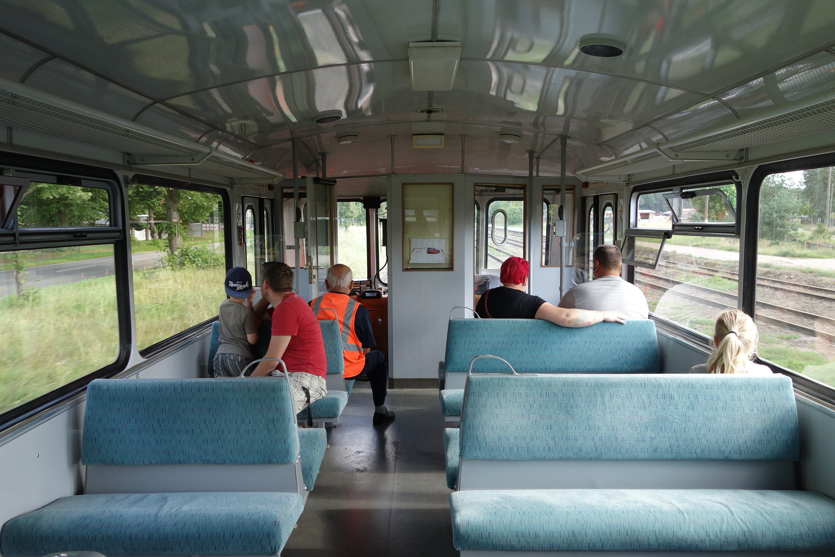 Schienenbus 172 001 ("Ferkeltaxe"), Innenraum